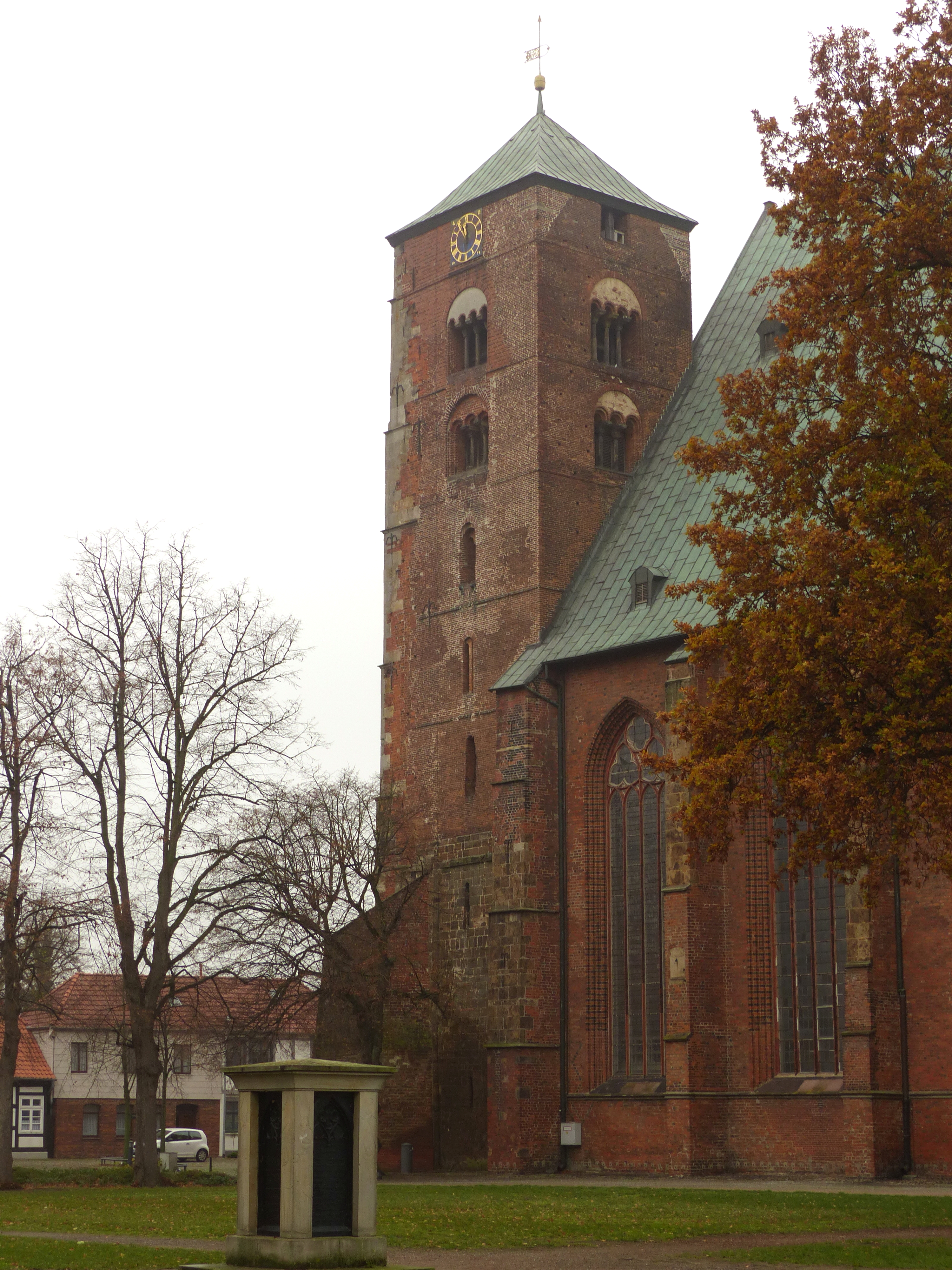 Der (romanische) Turm des Verdener Doms von Südosten